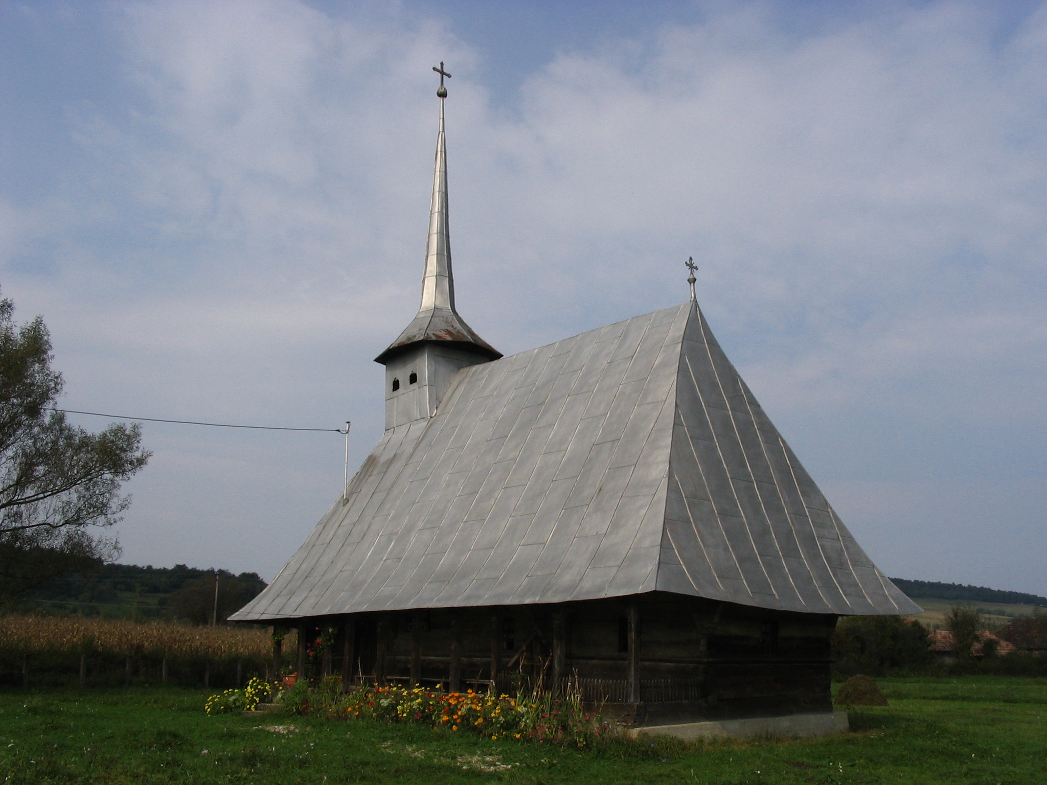 Biserica de lemn din Romita, judeţul Sălaj. Autor: Bogdan Ilieş Data: octombrie 2005